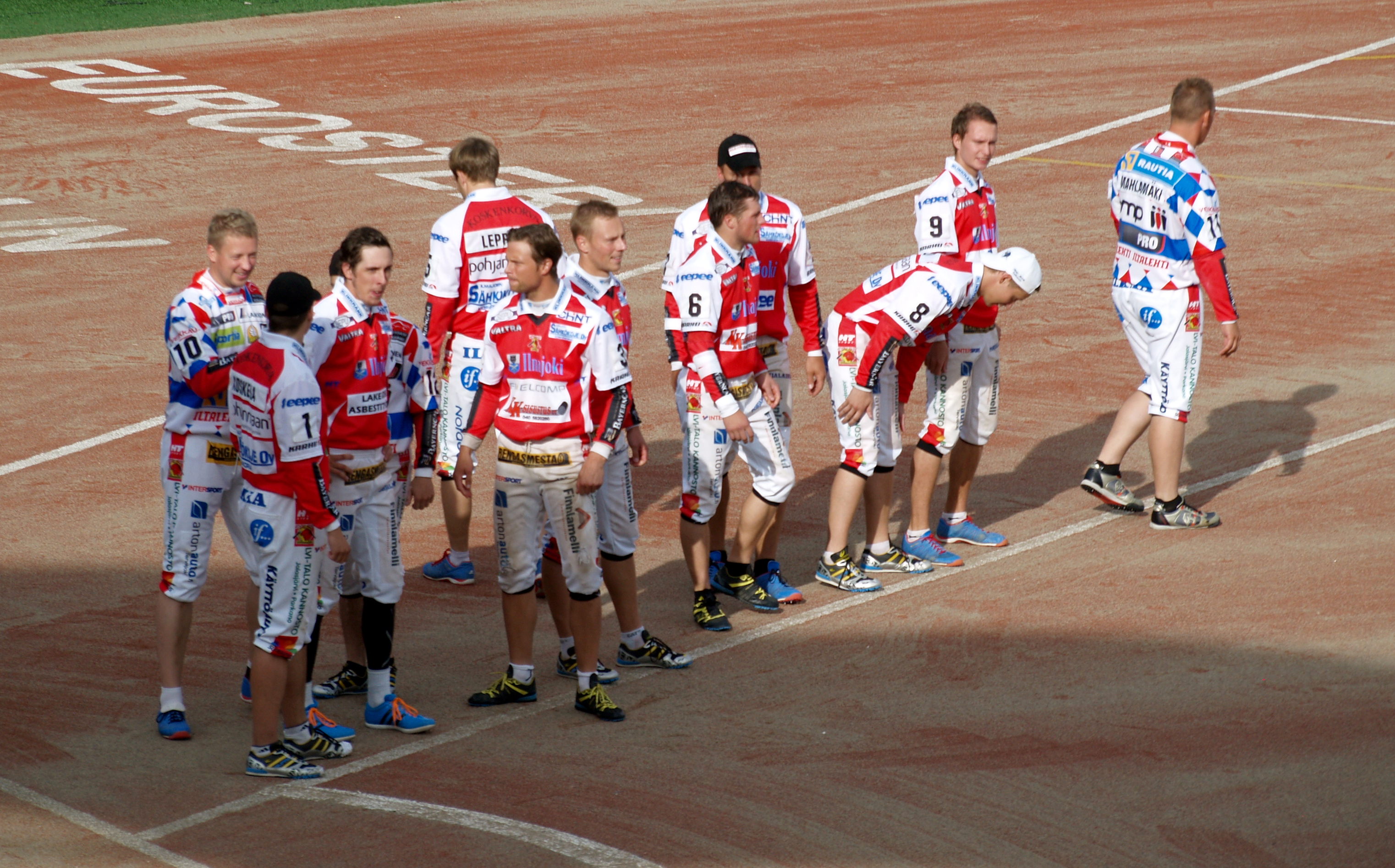 Vimpelin Veto - Koskenkorvan Urheilijat pesäpallo-ottelu 1.8.2014.